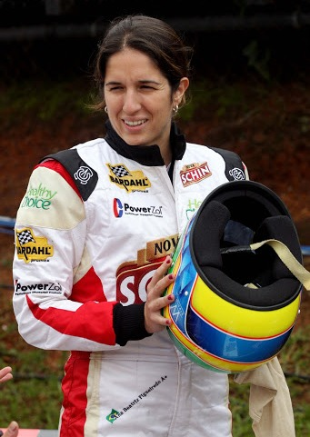 Bia Figueiredo - 2009